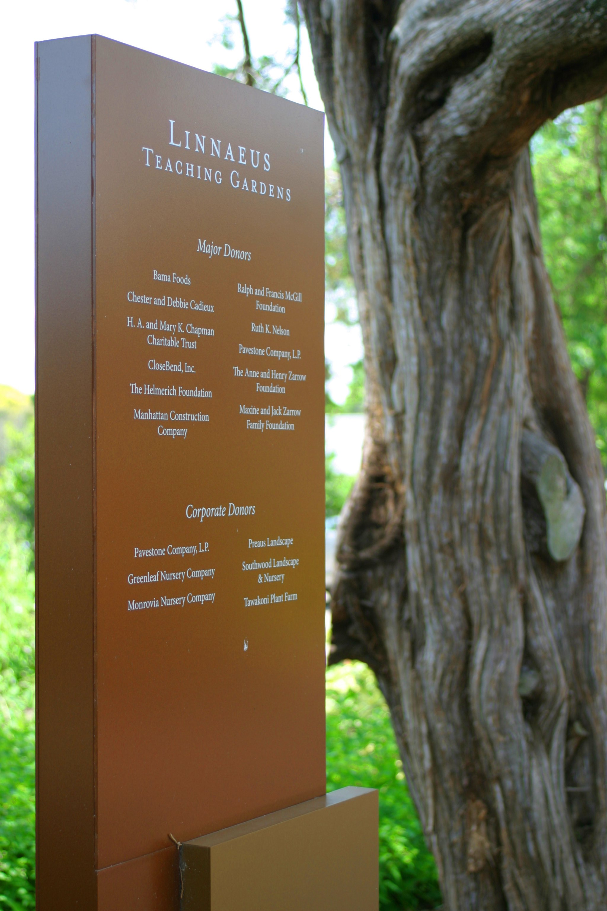 Linnaeus Teaching Gardens in Woodward Park, Tulsa, Oklahoma